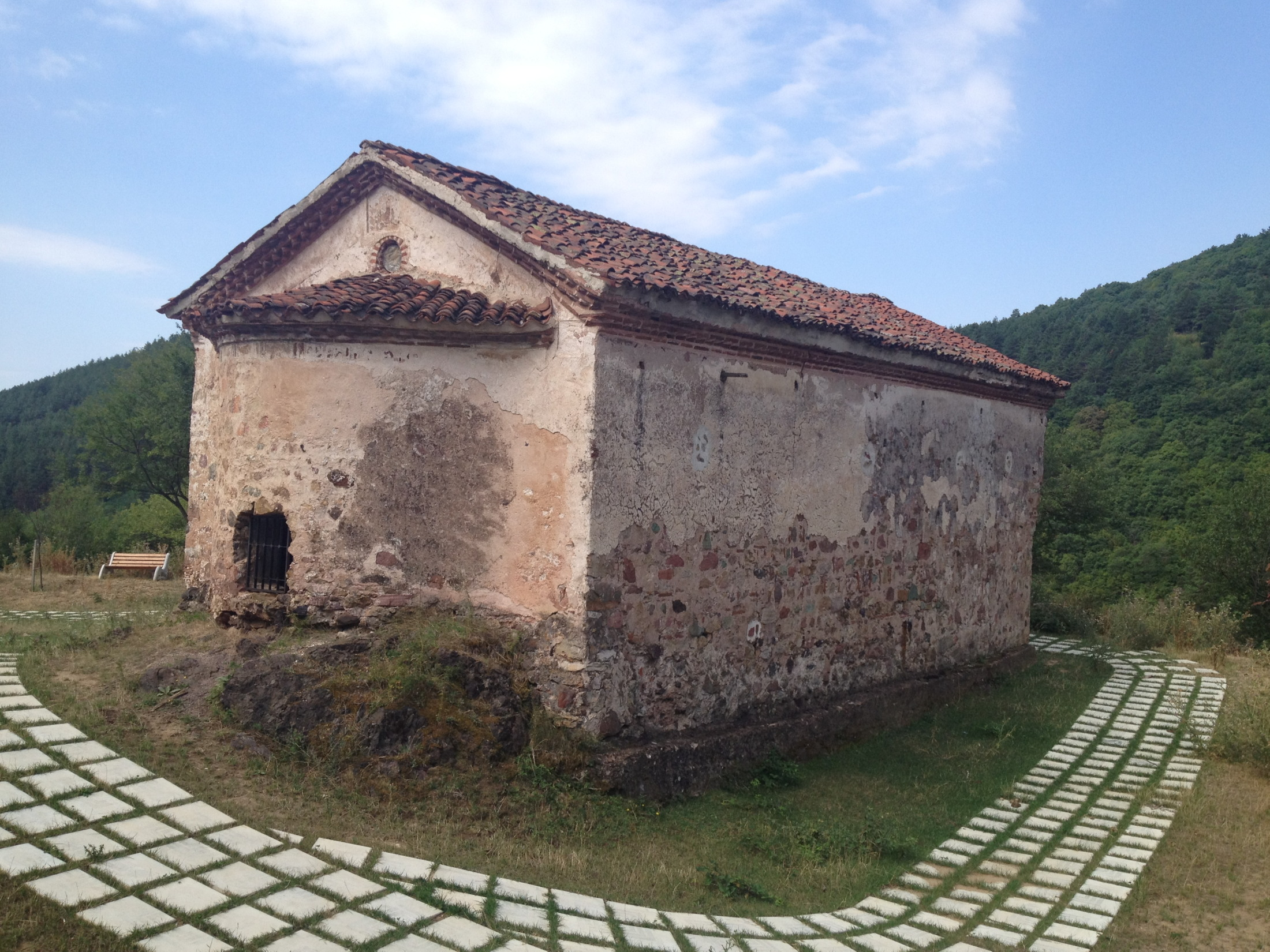 Църквата на манастира "Св. Николай" при Сеславци, сегашен вид.